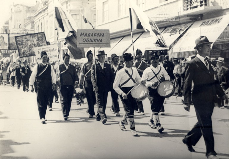 4-ти селскостопански културен и национален събор, 28 - 29 август 1938 г., гр. Варна. Парад на участниците в събора по ул. Княз Борис І. На преден план са представителите на Мадарска община.